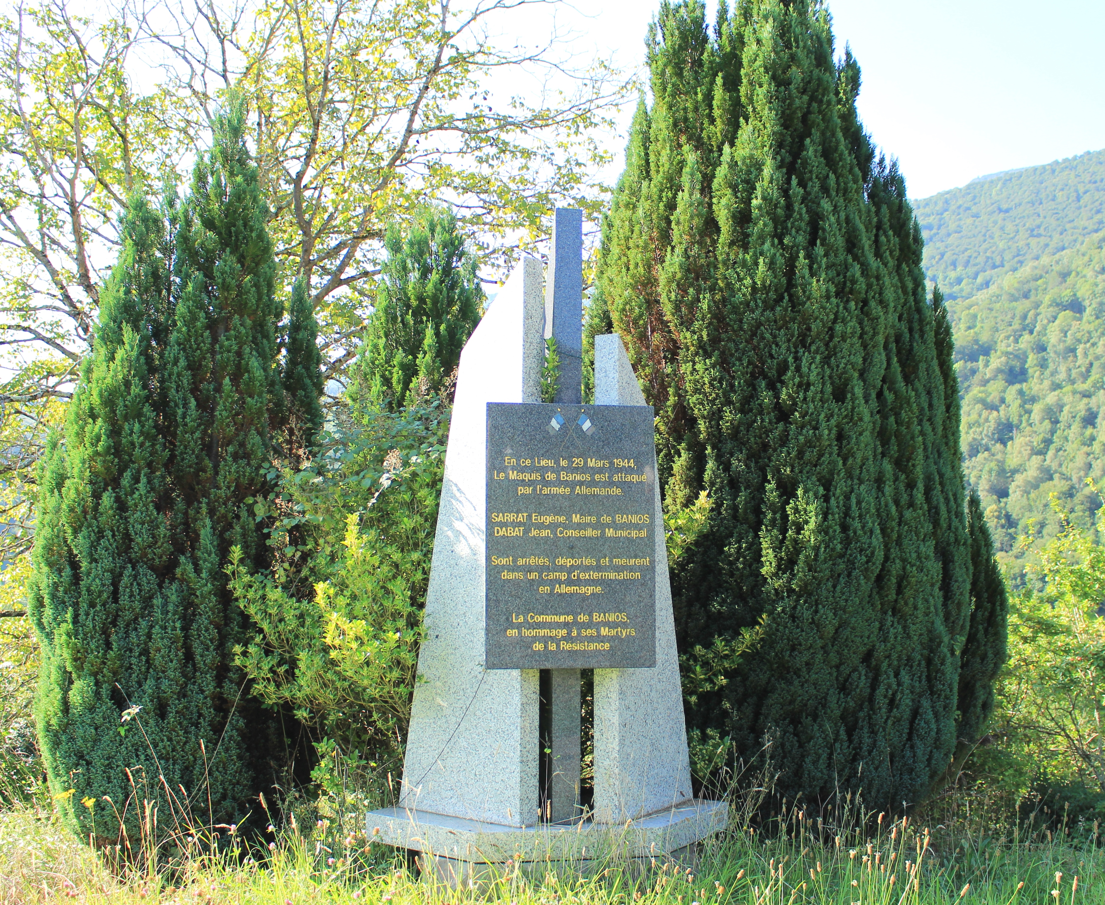 Monument aux morts de Banios (Hautes-Pyrénées)